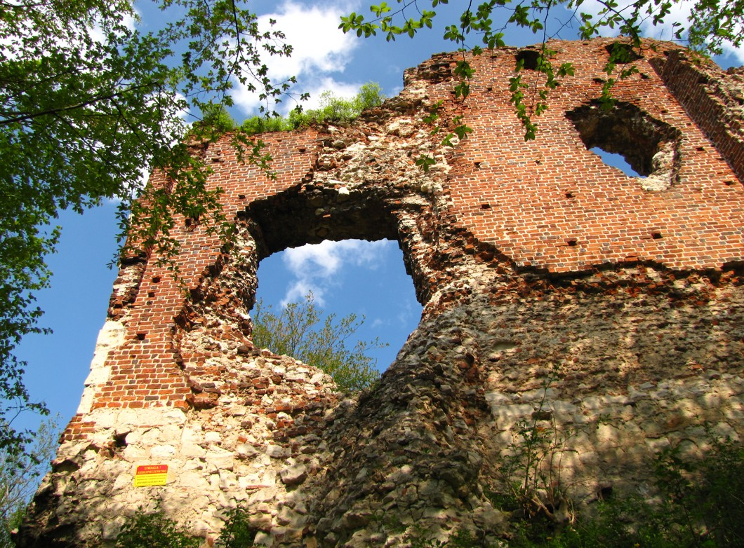 Bochotnica - ruiny zamku wraz z Górą Zamkową {zabytek nr rejestr. A/449 z 24.03.1970)